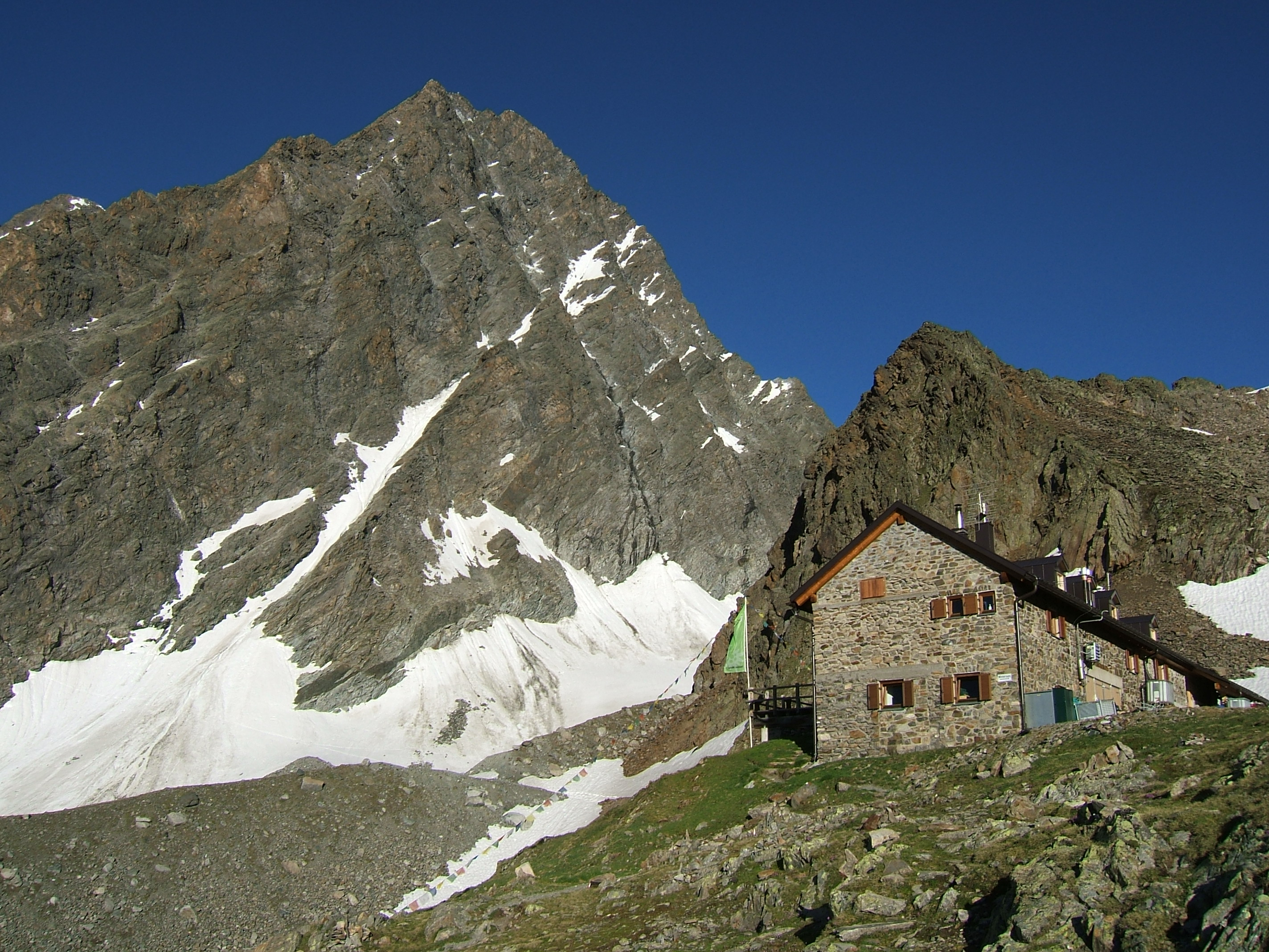 Watzespitze von der Kaunergrathütte, Ötztaler Alpen, Tirol, Österreich